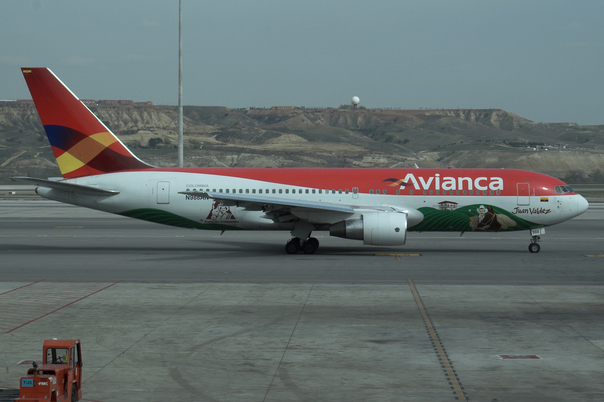 Avianca Boeing 767-259ER N988AN "Juan Valdez" at Madrid MAD/LEMD